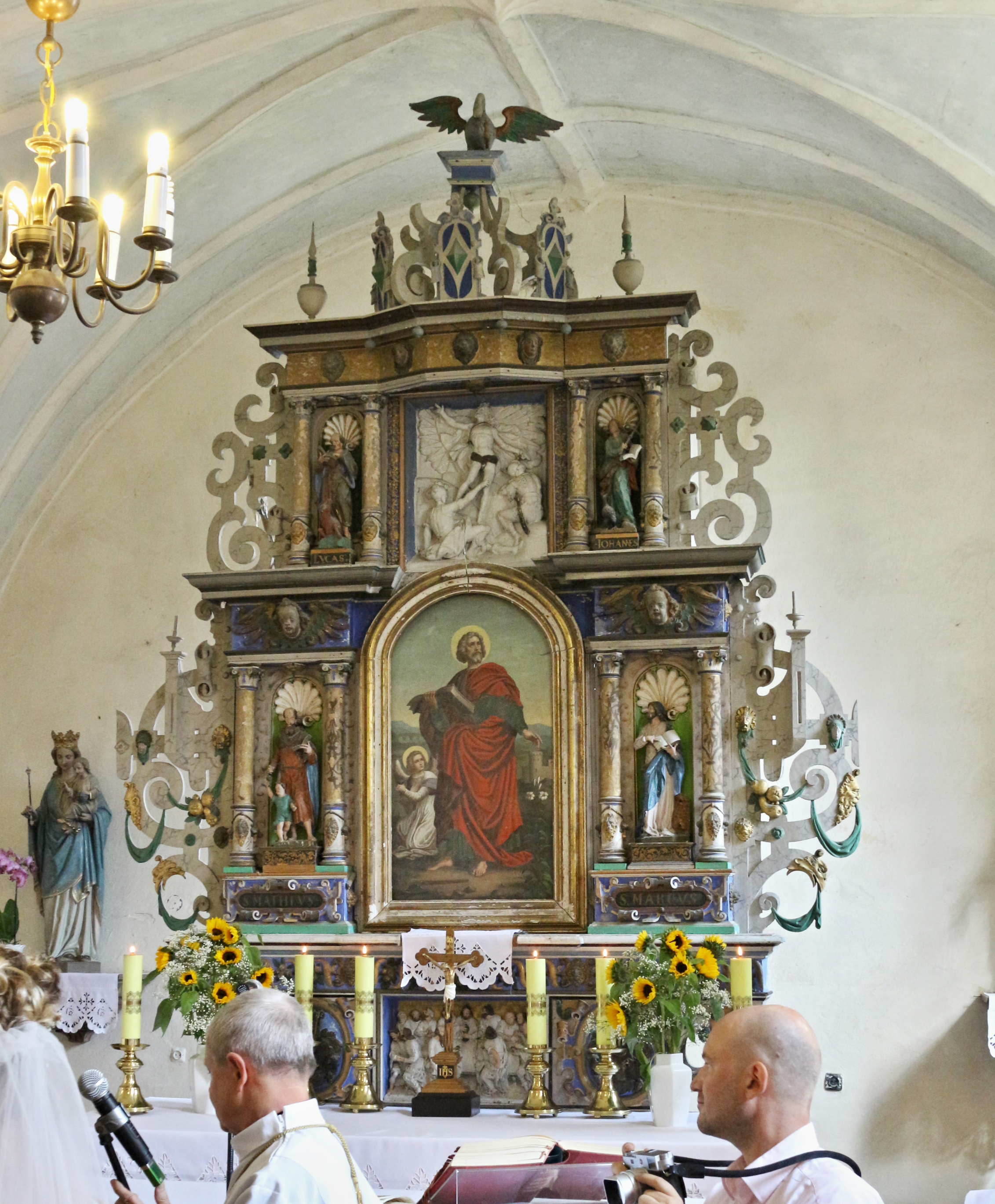 Interiér kostela sv. Matouše, Stara Białka